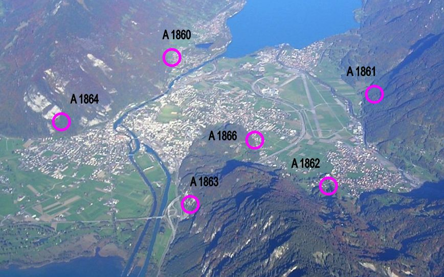 Artilleriewerke Bödeli, Interlaken BE, Schweiz